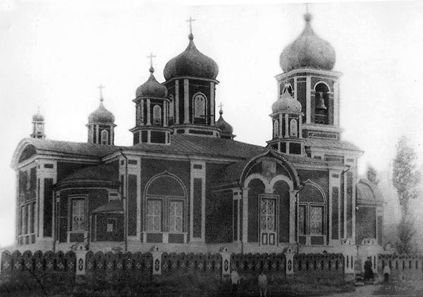 Ростовская область Ефремово-Степановка. Церковь Стефана Архидиакона.